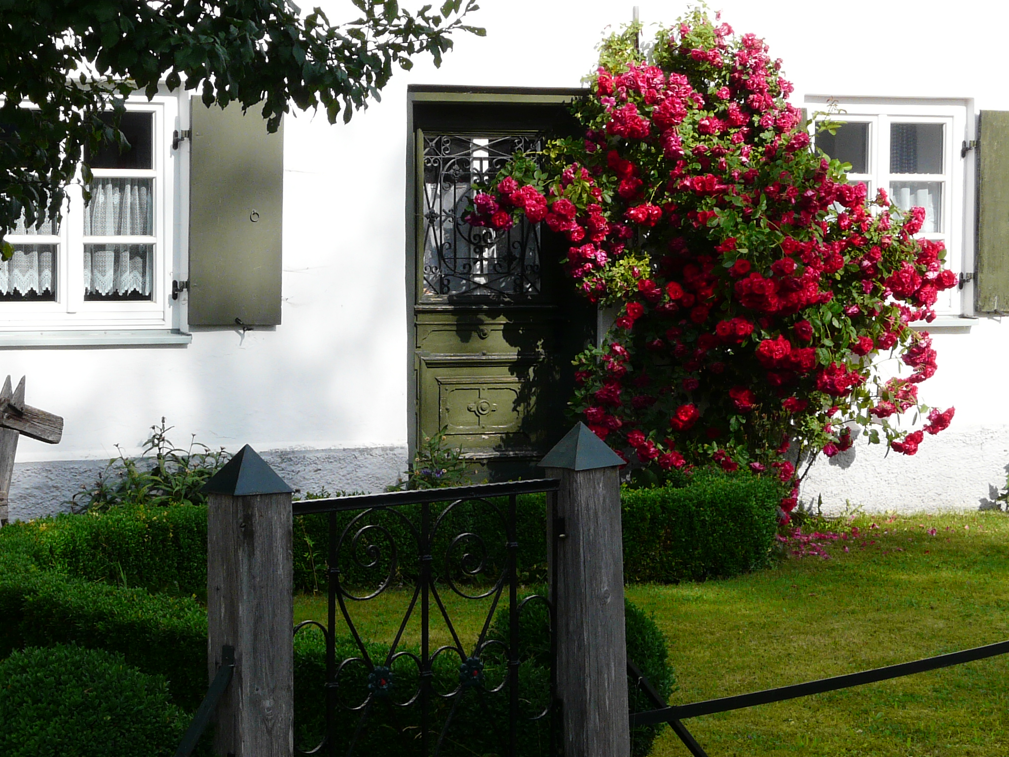 An der Ach 4 in Unterthingau - Detail